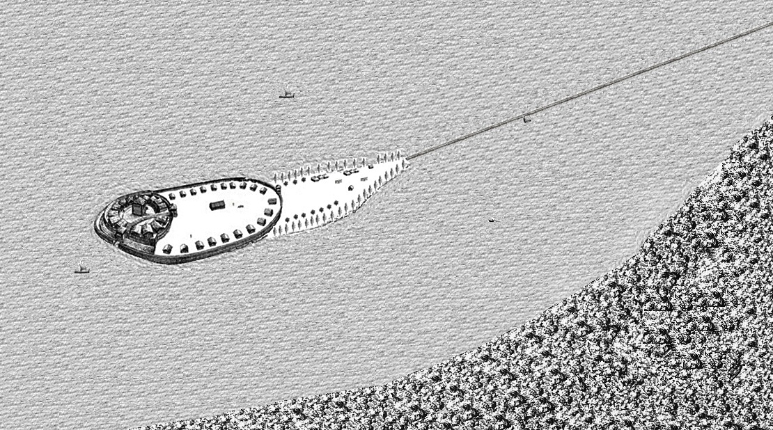 Rekonstruktionsversuch Burgwallinsel Teterow